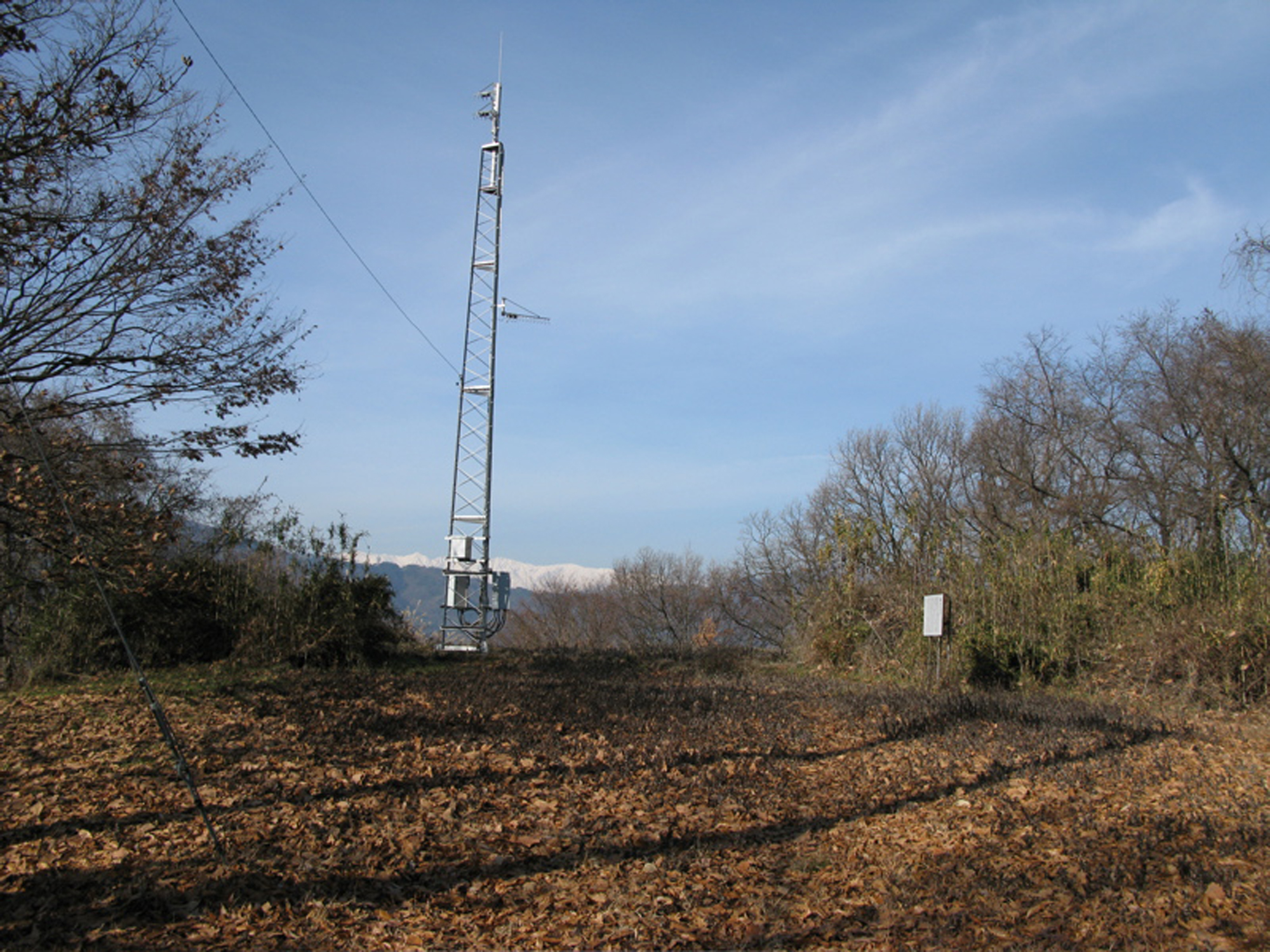 屋代城